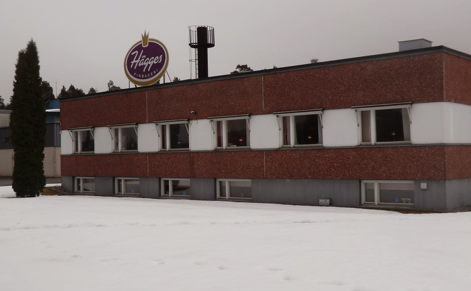 Fabrikslokaler i Själevad.